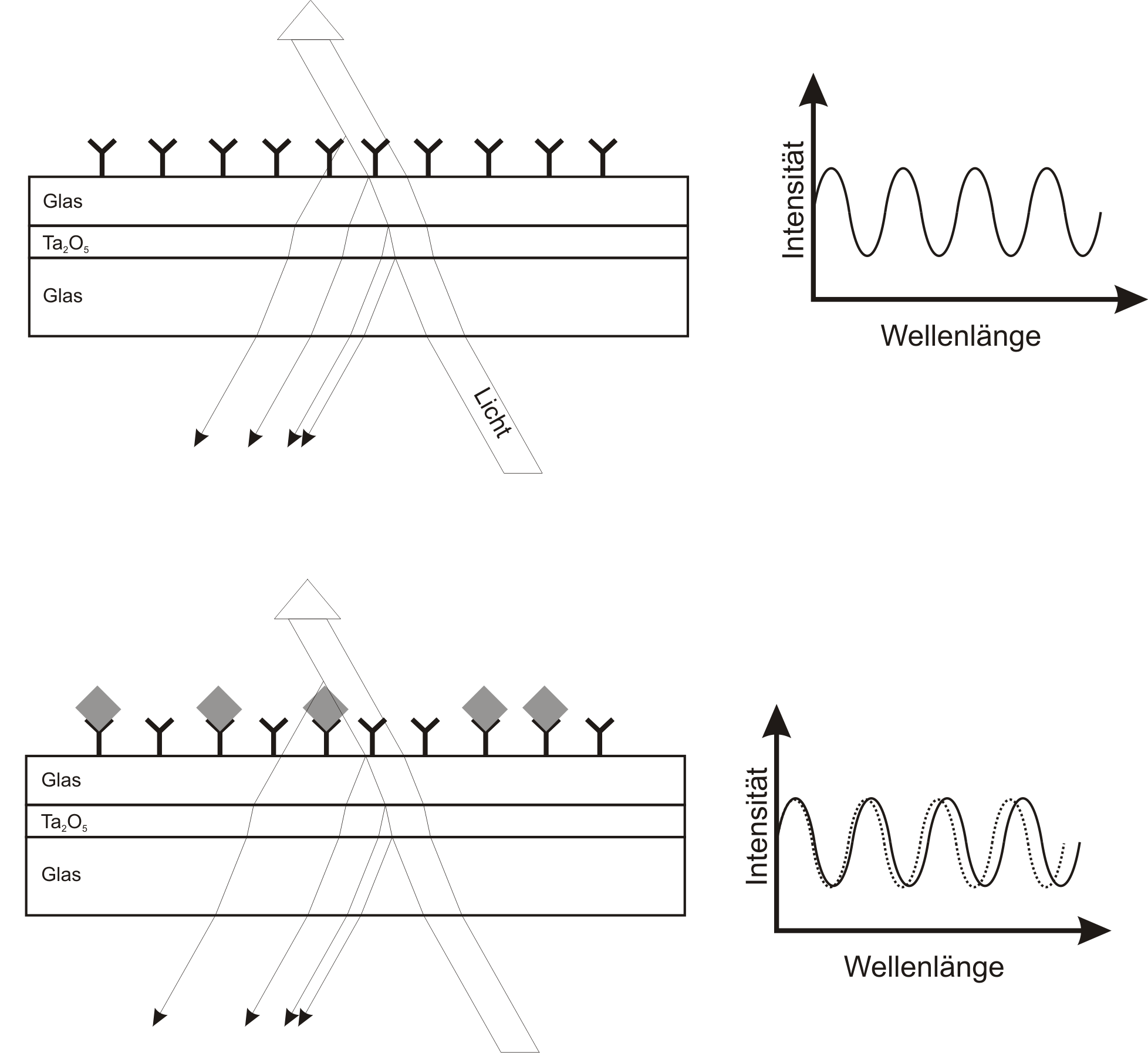 Schematische Darstellung eines Schichtsystems mit Mehrfachreflexionen in Korrelation mit der Verschiebung des Interferenzspektrums.